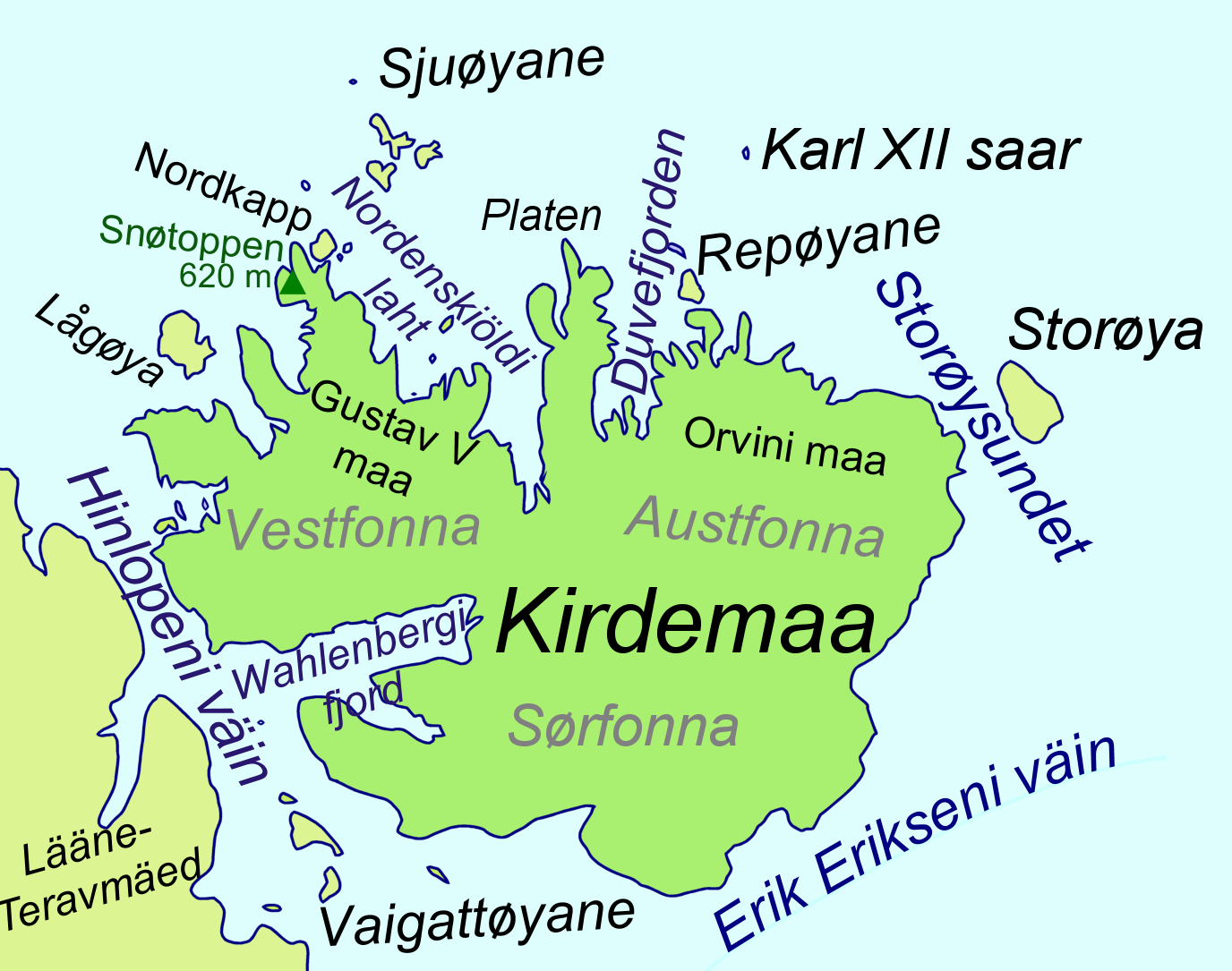 Kirdemaa kaart